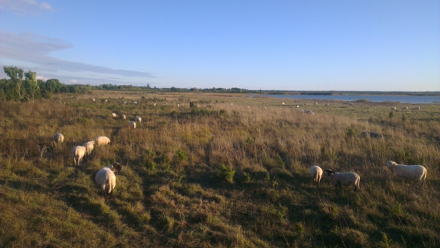 Lambad rannaniidul